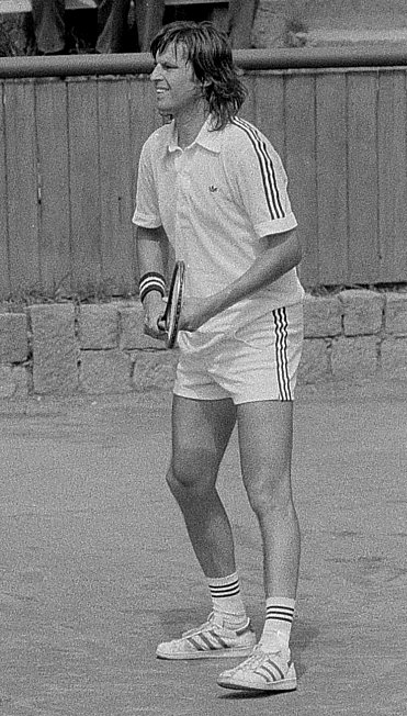 Jiří Hřebec, Finále Mistrovství ČR 1981, Plzeň